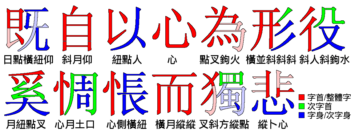 倉頡法示例，自作。